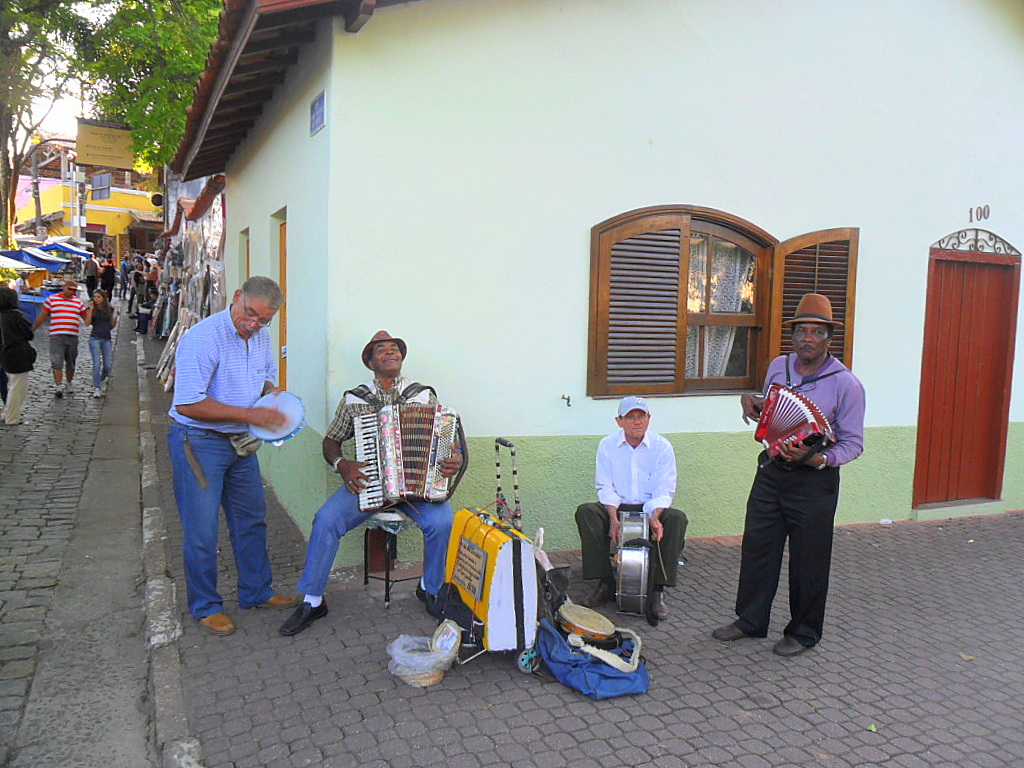 Músicos na Rua Padre Belchior Pontes, centro de Embu das Artes, SP, Brasil.